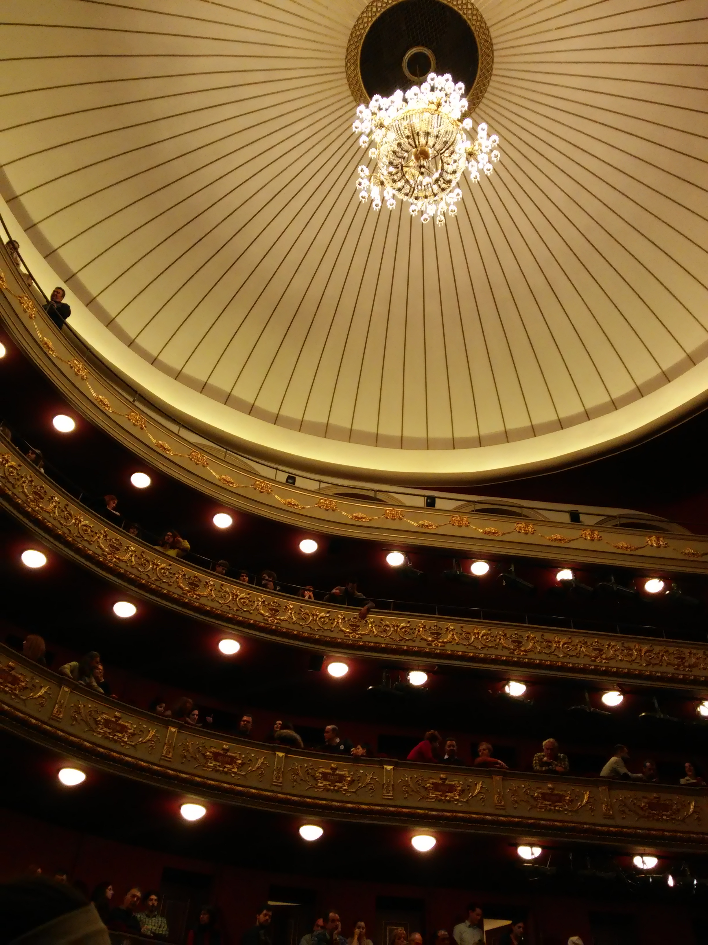 «Δημοτικό Θέατρο Πειραιά»